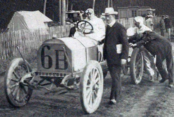 Grand Prix de l'ACF 1906, Marriaux sur Mercedes se rendant au départ.